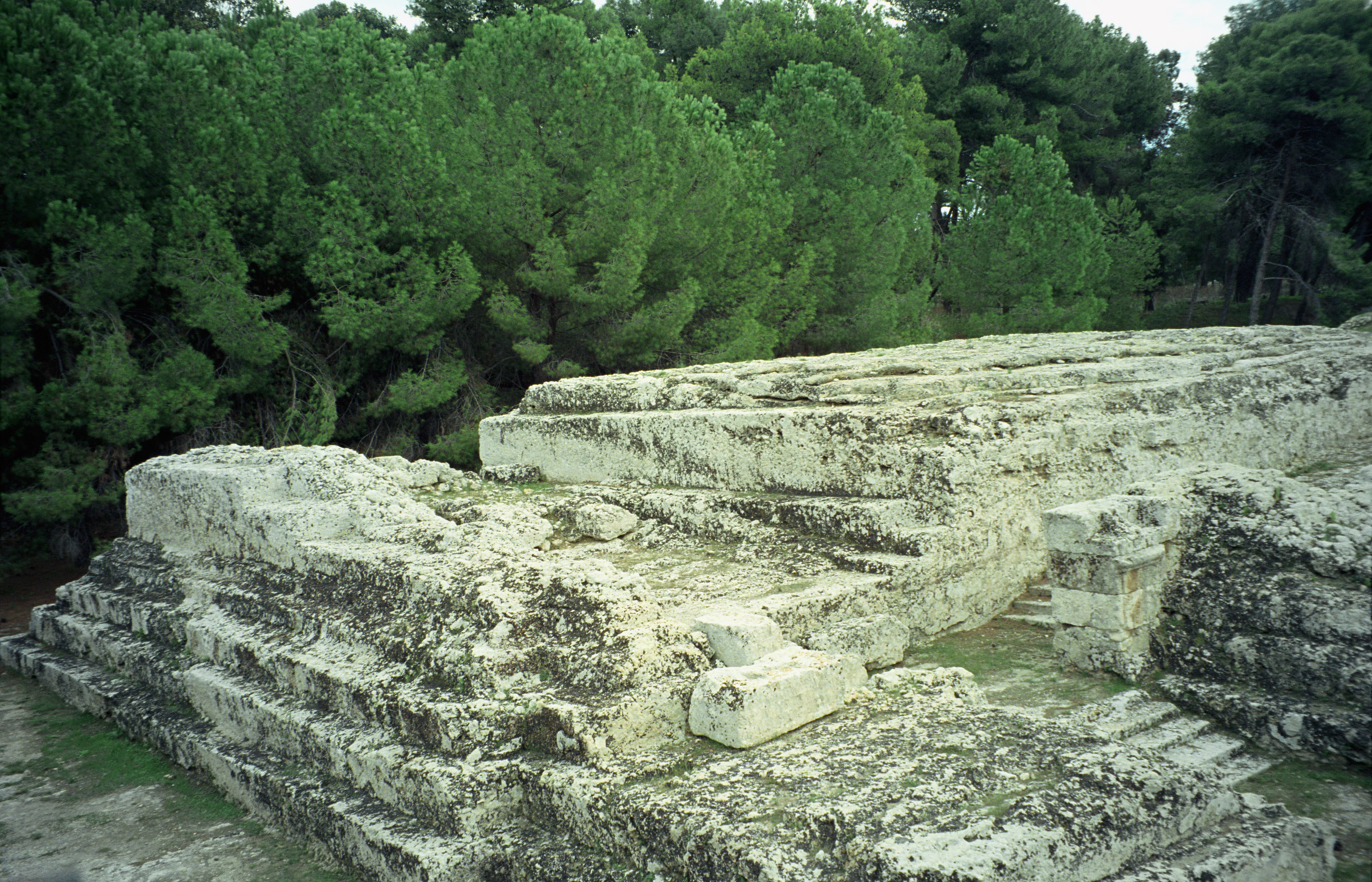 L'Altare di Gerone II a Siracusa.